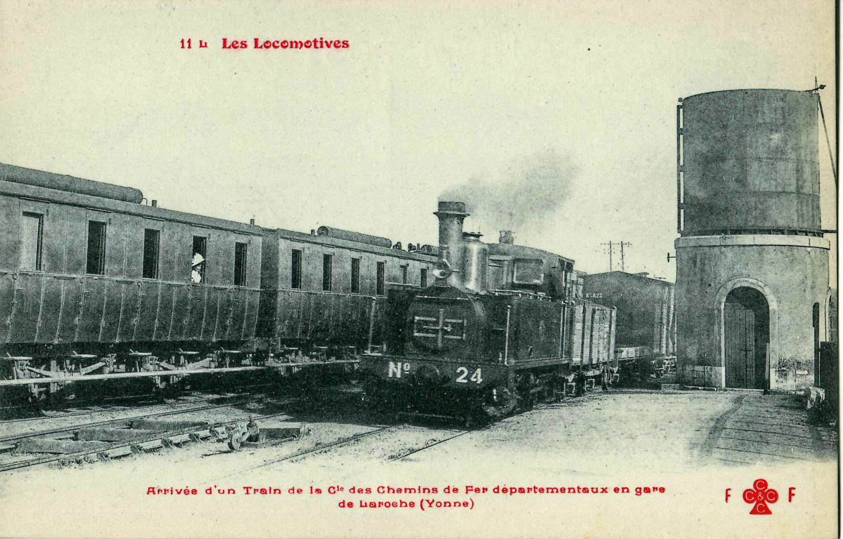 Carte postale ancienne éditée par FF - CCCC, collection Les locomotives, n°11 : Arrivée d'un train de la Cie des Chemins de fer départementaux en gare de Laroche (Yonne)